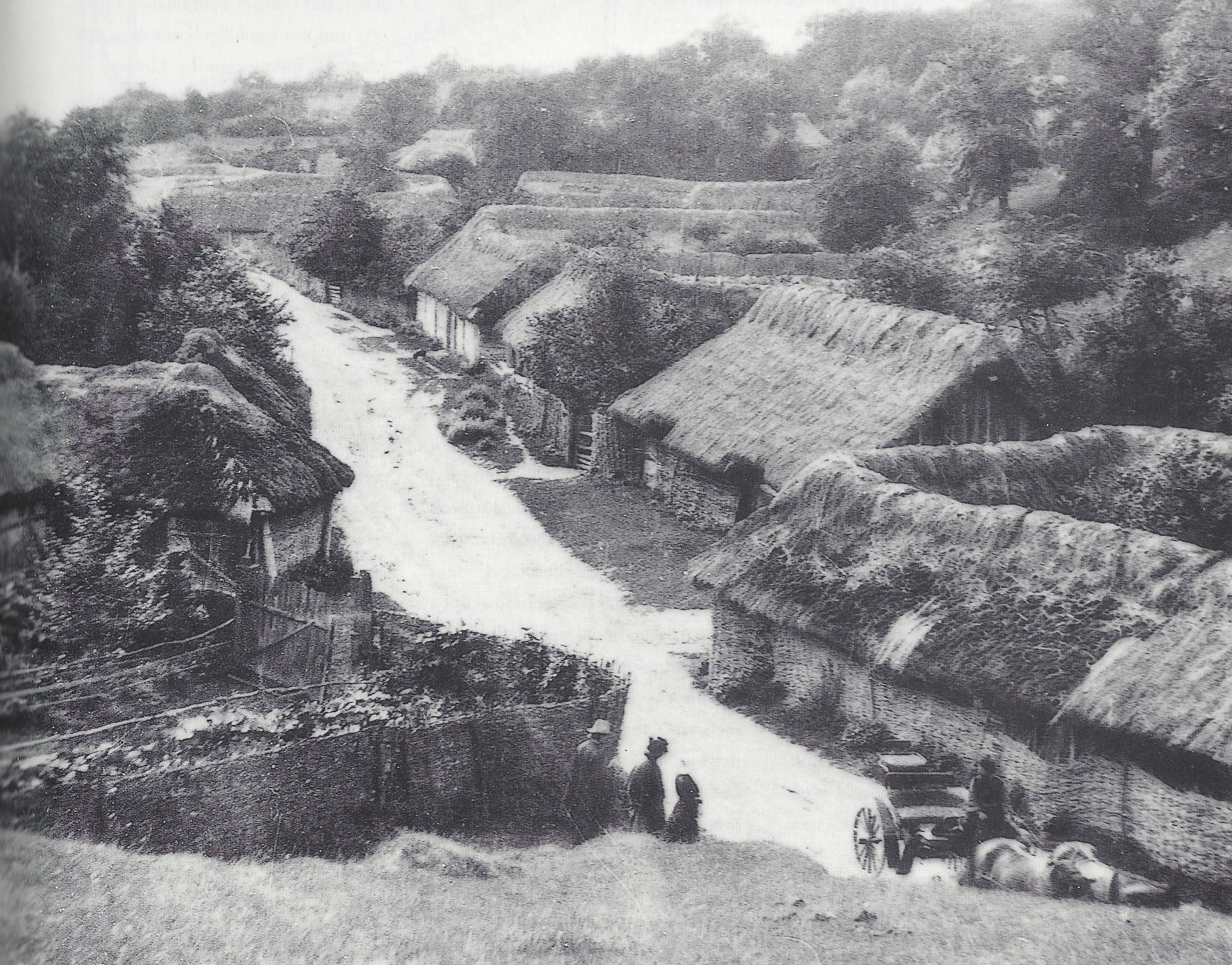 „Das ukrainische Dorf Horodok um 1900, wo der Wohltäter und Politiker Baron Theodor Steinheil lebte und wirkte.“